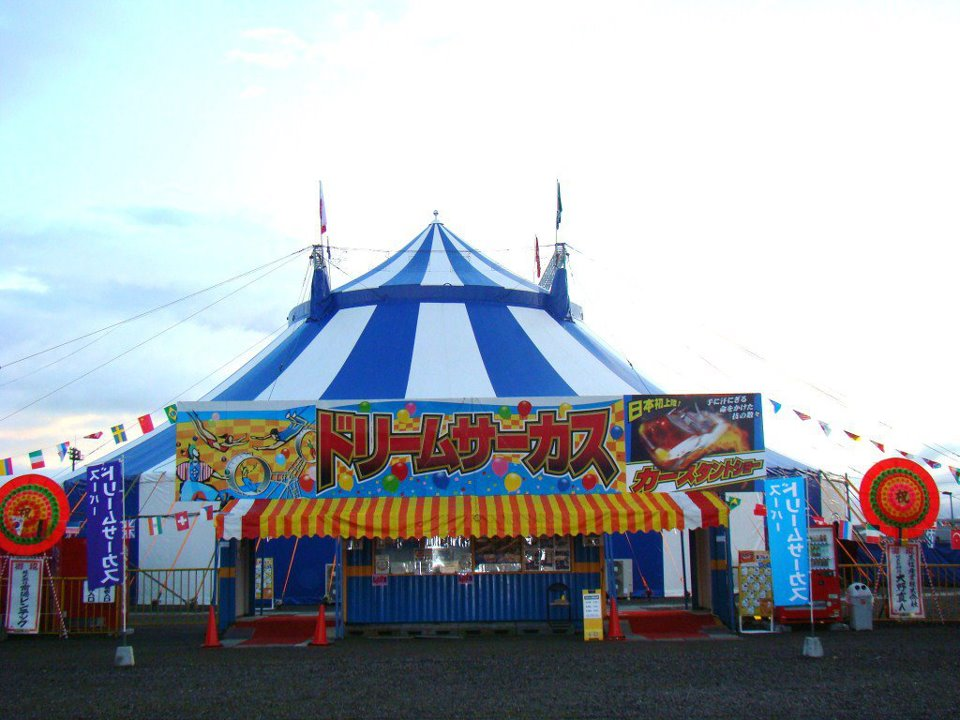 テント外観